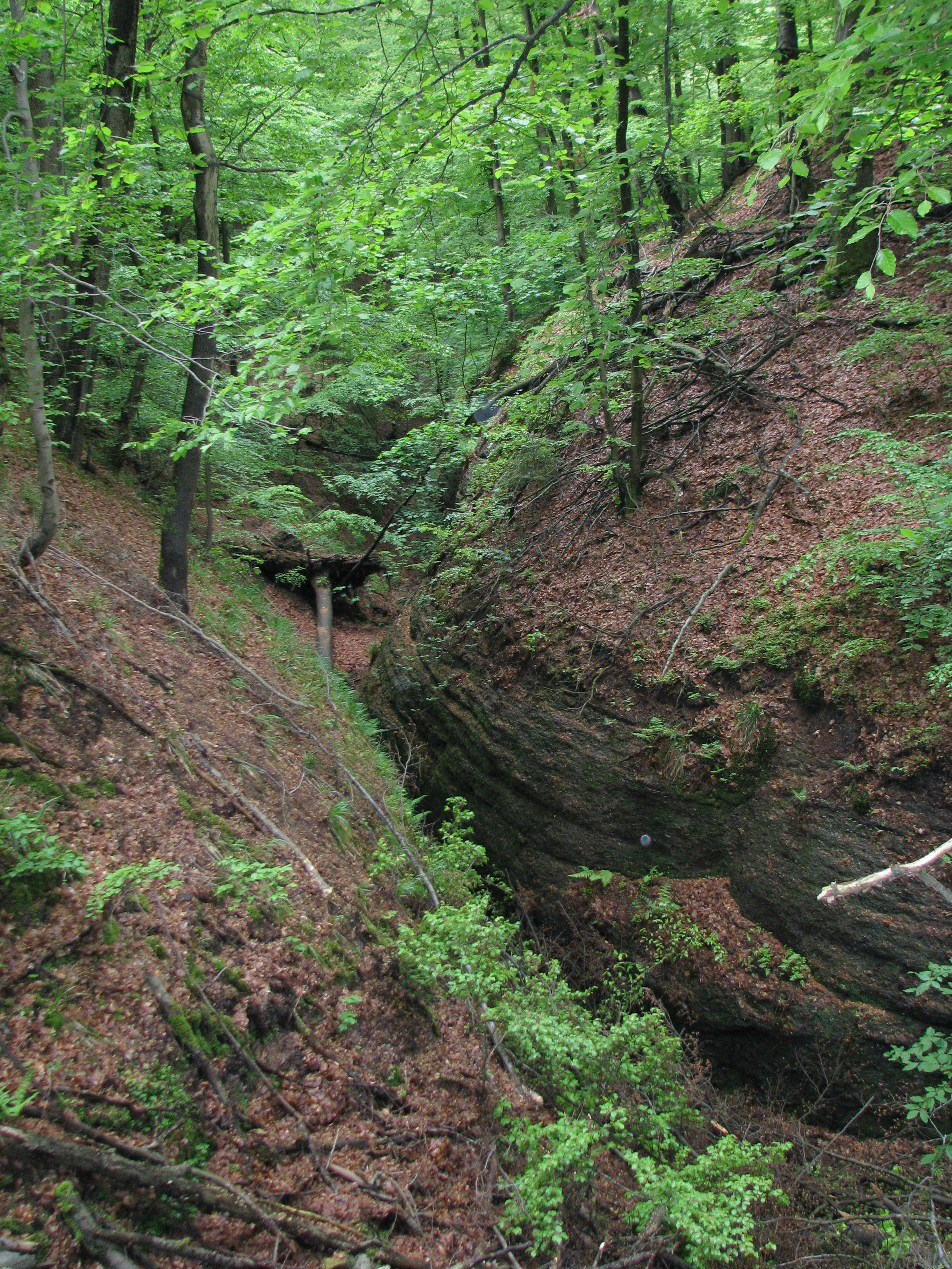 Blick in die Landgrafenschlucht bei Eisenach. Die Felsen bestehen aus den Konglomeraten der Eisenach-Folge des Oberrotliegenden.